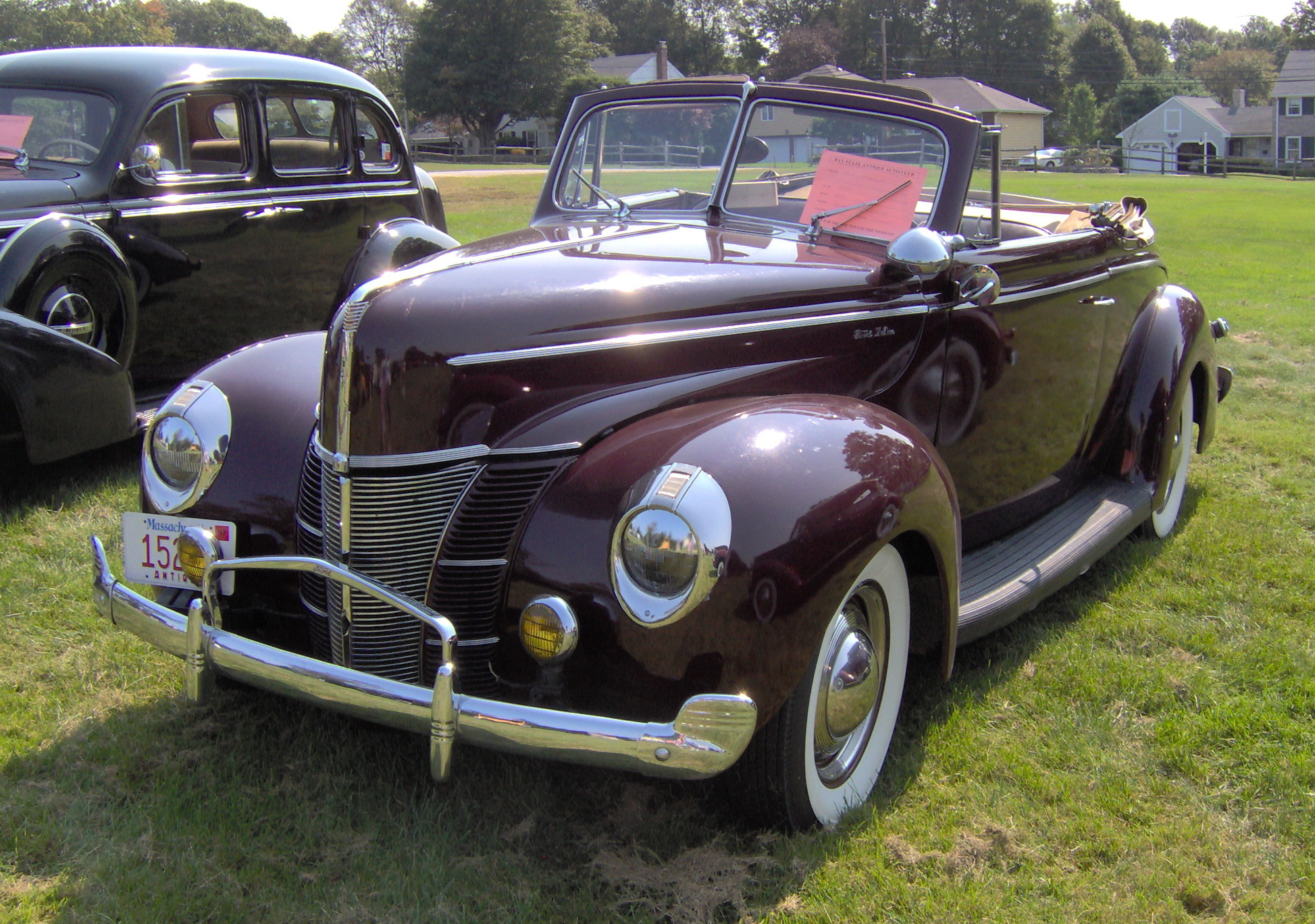 1940 Ford DeLuxe convertible